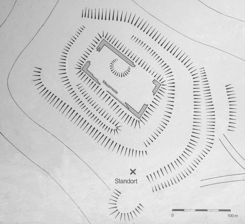 Skizze der Burgruine Hausfreden